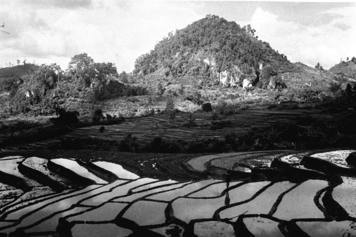 Foto. Herinneringen uit Sindanglaja aangeboden door De Vereeniging "Poerwa Tani". Sawah terassen nabij Sindanglaya